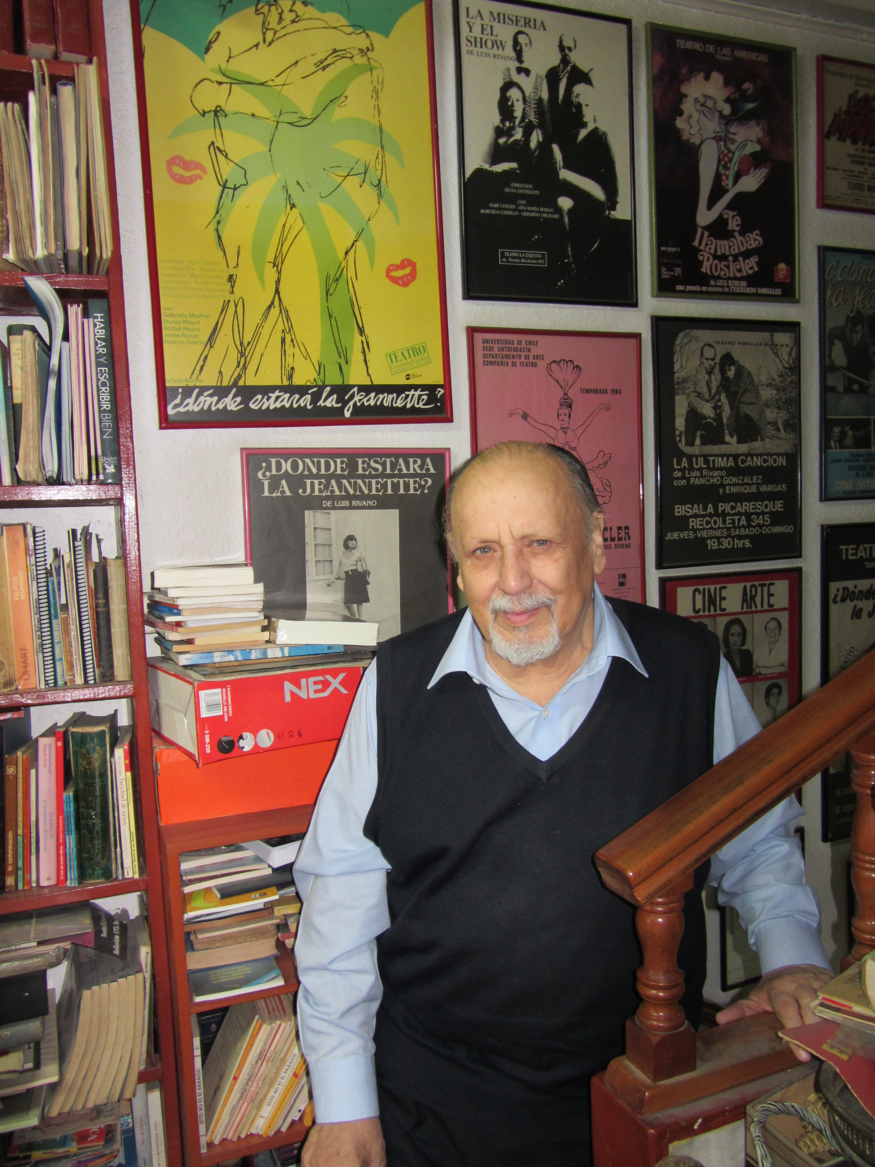 El escritor chileno Luis Rivano con los carteles de sus obras de teatro en su librería de la calle San Diego, Santiago